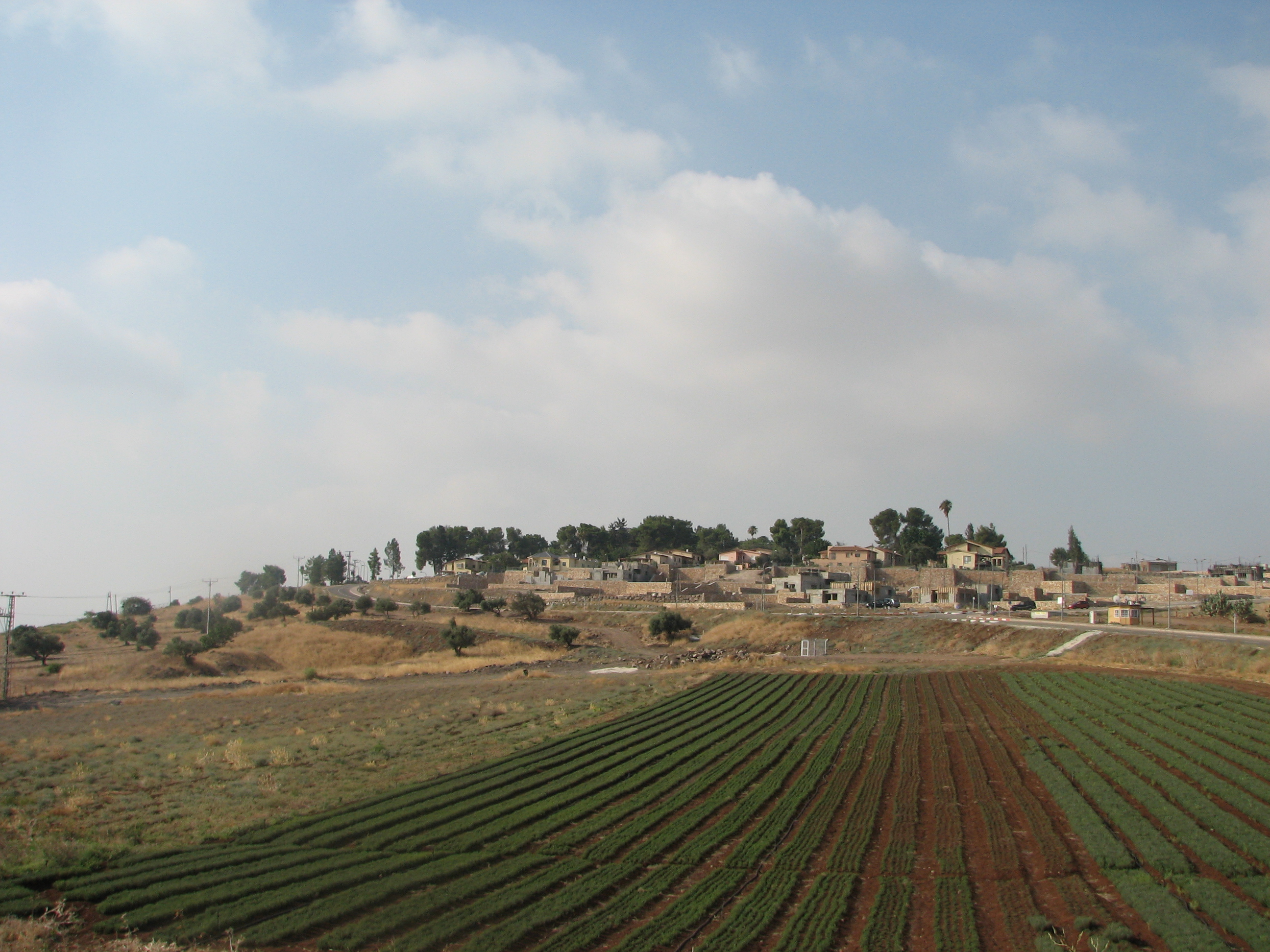 Alummot is a kibbutz in northern Israel. Located to the south of the Sea of Galileeץ אלומות הוא קיבוץ היושב על גבעה הצופה על הכנרת ויישובי עמק הירדן. הוא שייך למועצה אזורית עמק הירדן.